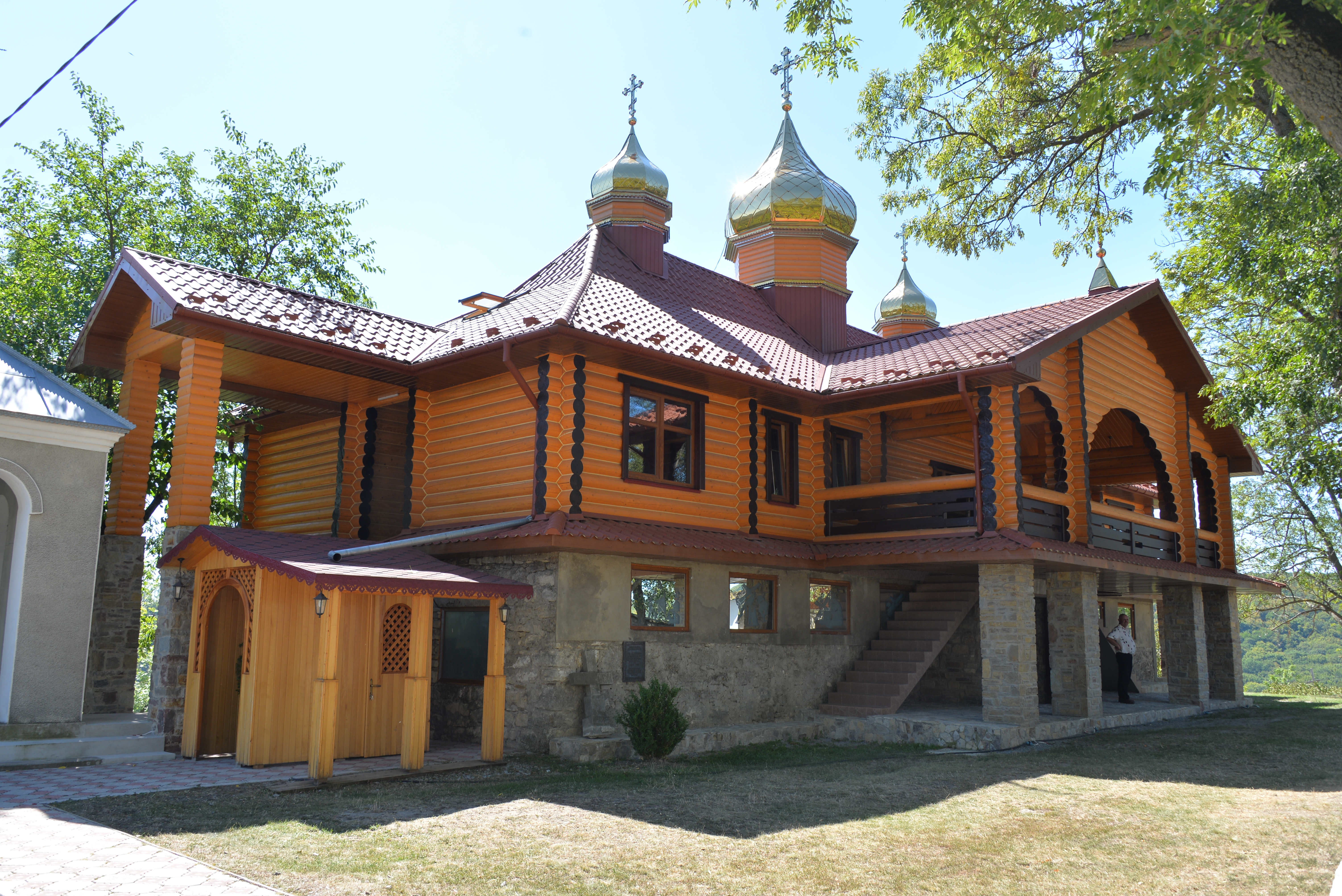 Келії василіанського монастиря, спотворені "євроремонтом", с. Міжгір'я